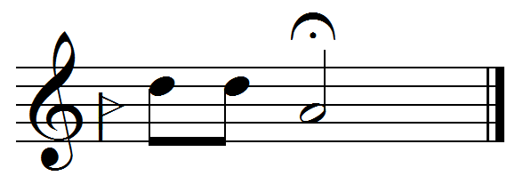 (فرود شور (بال کبوتر